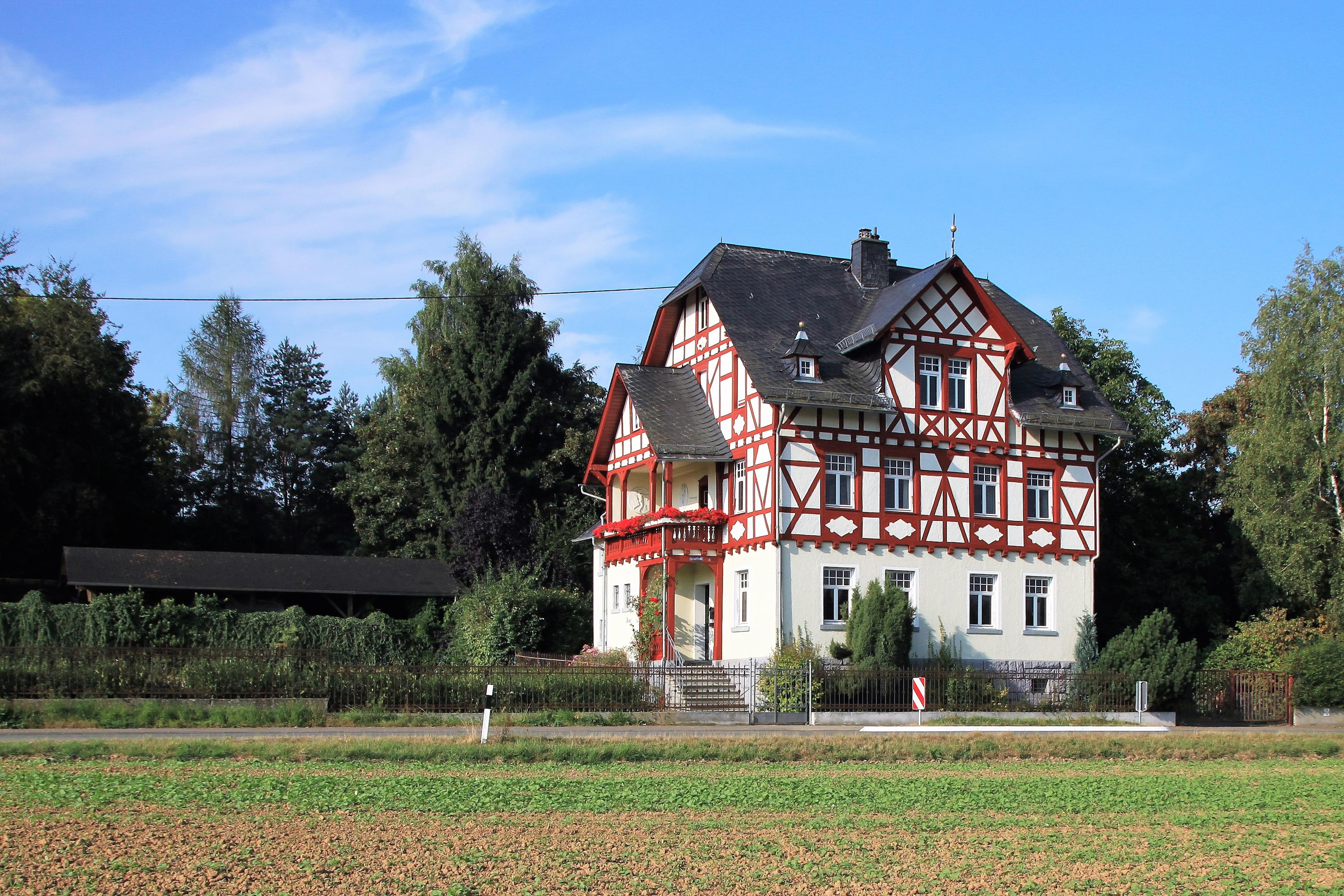 Dörsdorf - Wohnhaus, Hauptstraße 2 mit Stallungen